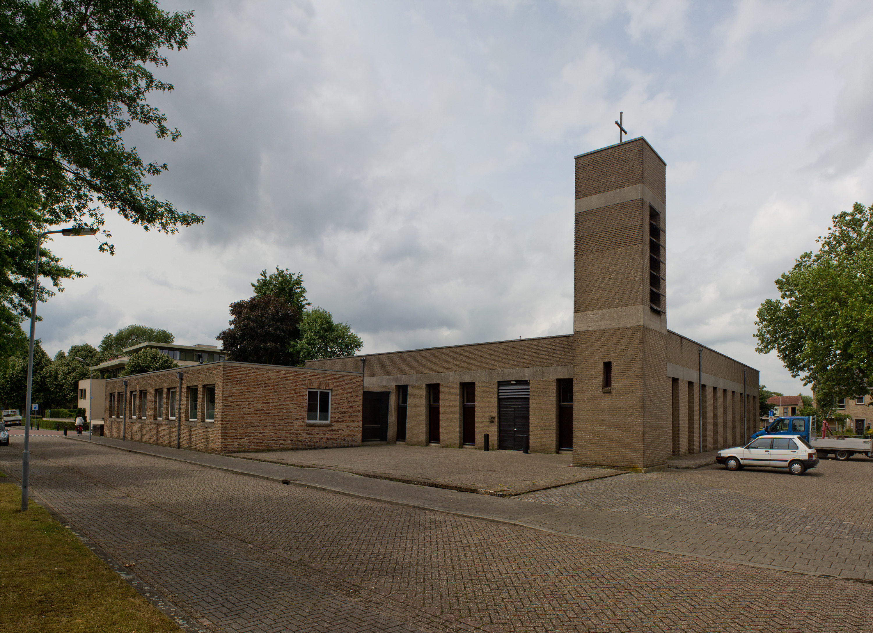 Lucaskerk. Zuiderparklaan, Den Bosch. 1961/1972. Jan de Jong en Nico van der Laan.